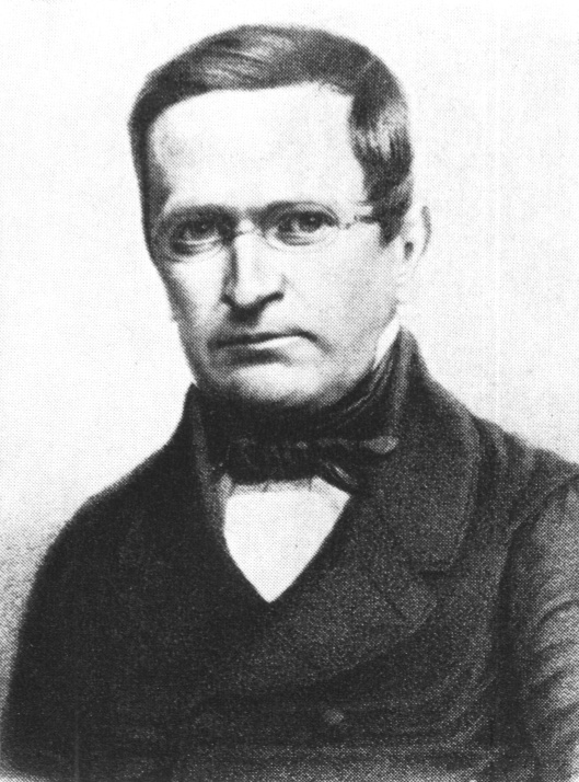 Otto Theodor Freiherr von Manteuffel (1805–1882) preußischer Ministerpräsident 1850–58